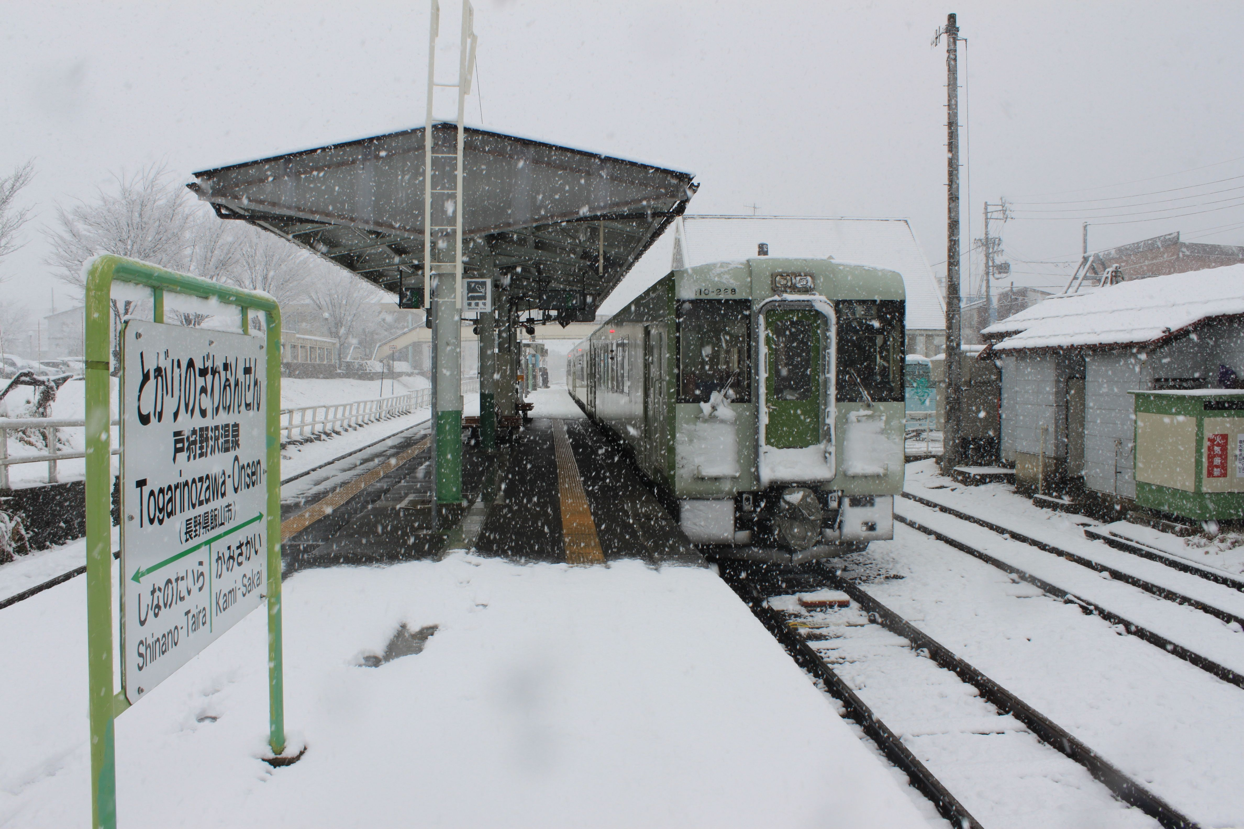 戸狩野沢温泉駅